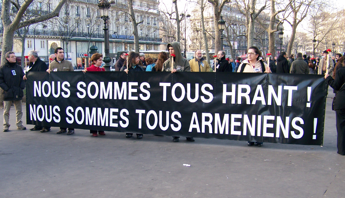 Affiche marche silencieuse Dink